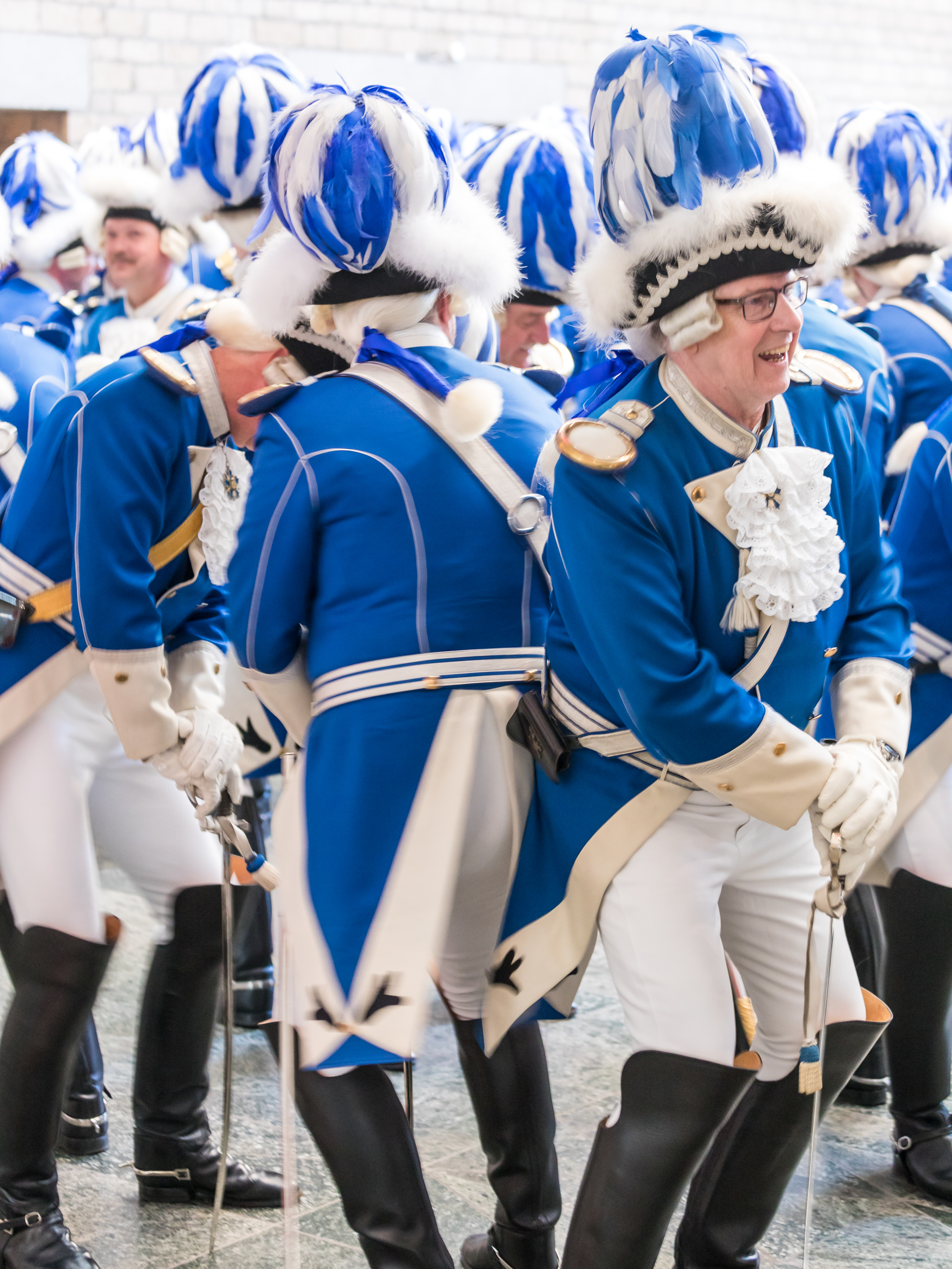 Appell Kölner Funken Artillerie blau weiß von 1870 (Blaue Funken) im Kölner Rathaus - Weiberfastnacht 2019